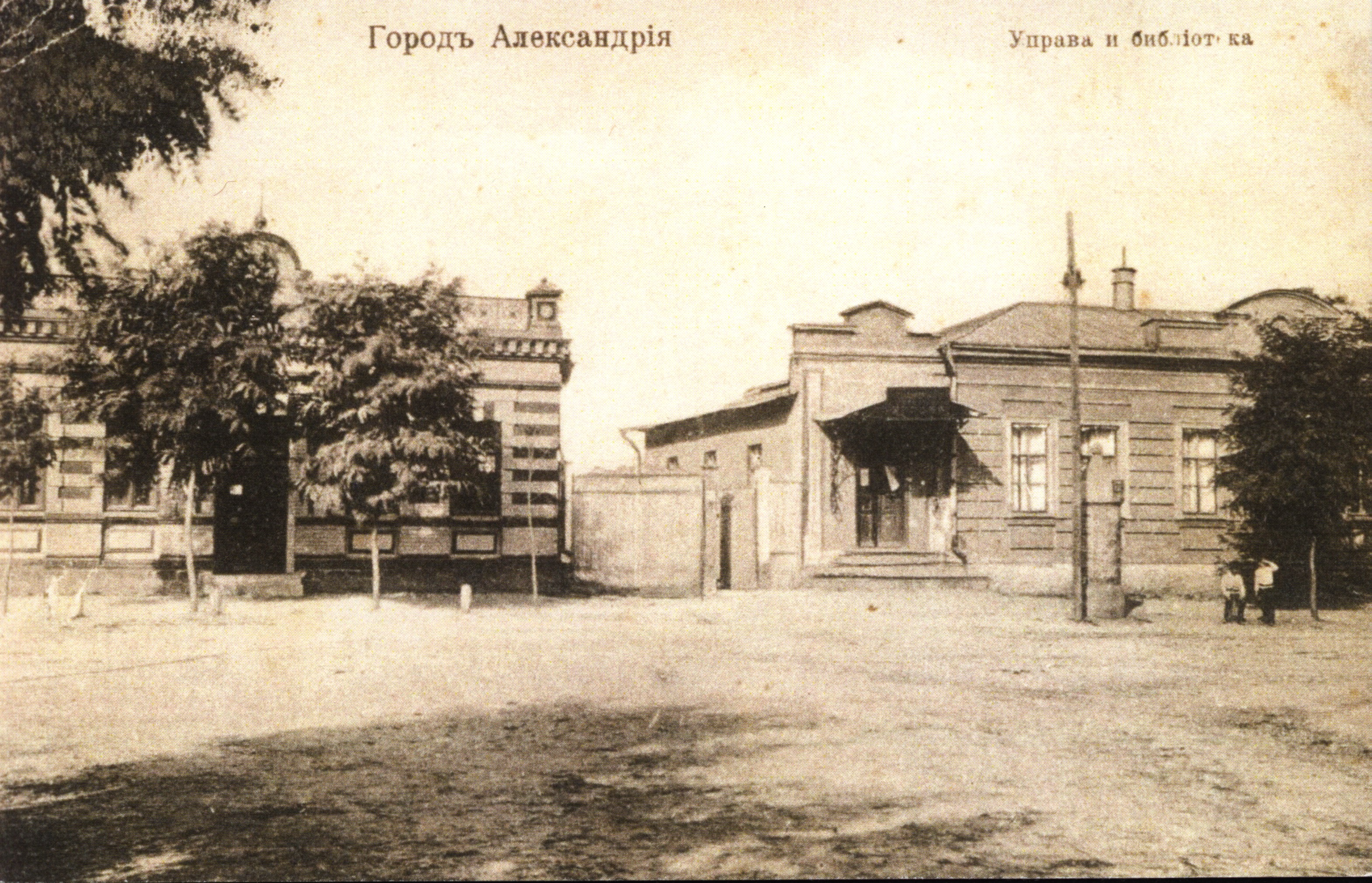 Управа и и библиотека